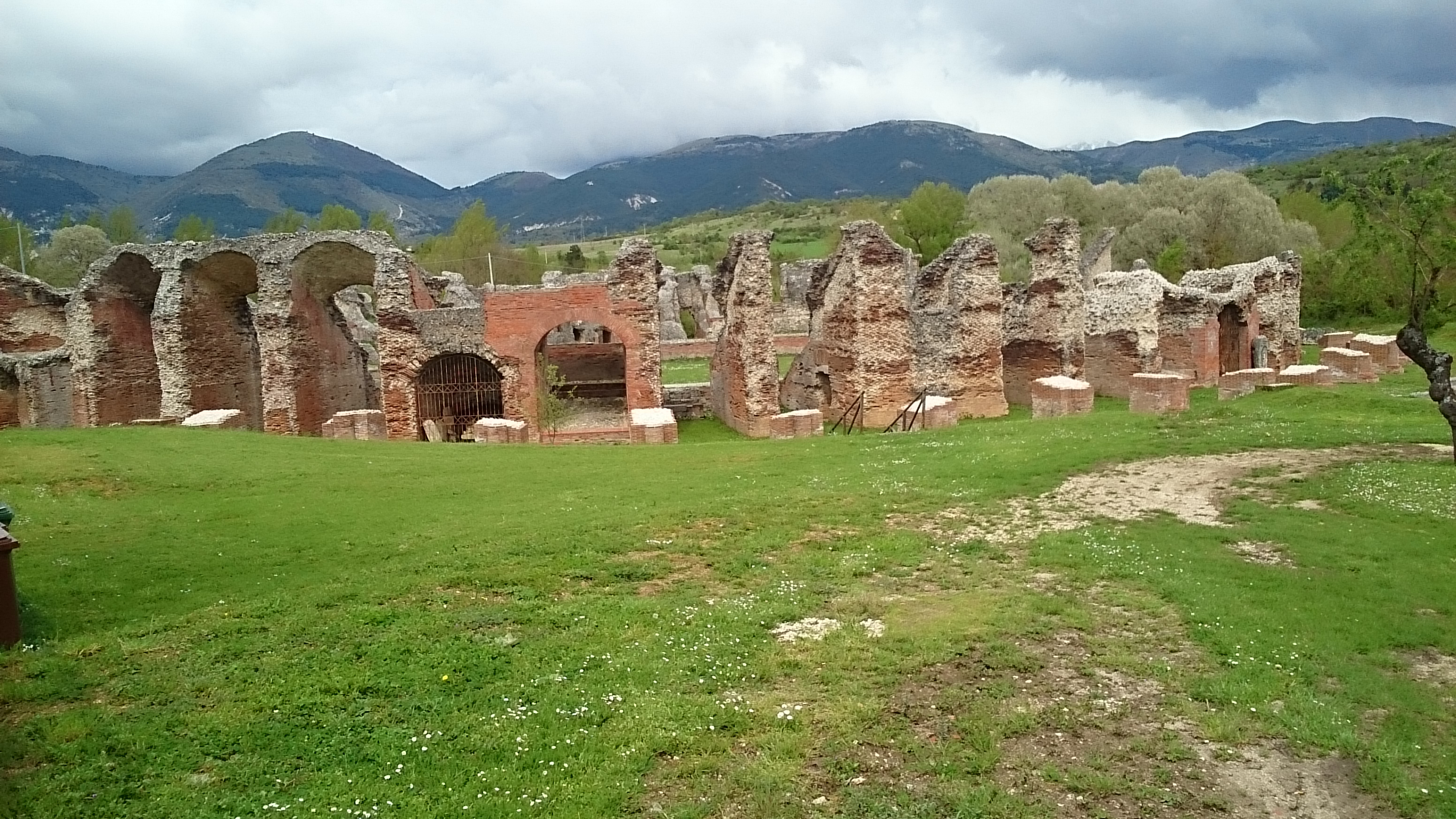 Amiternum - Anfiteatro Romano